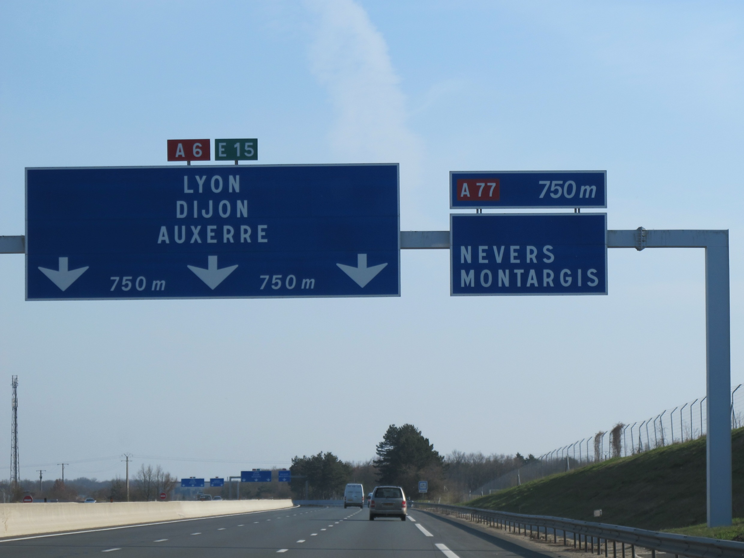 Autoroute A6 - France